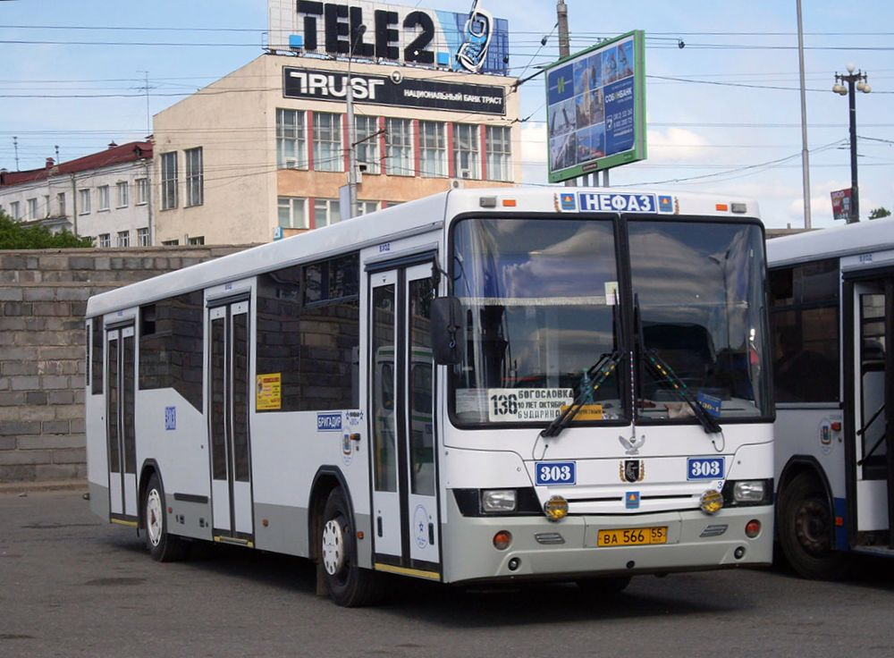 Автобус НефАЗ-5299 на улице Бударина в г. Омске